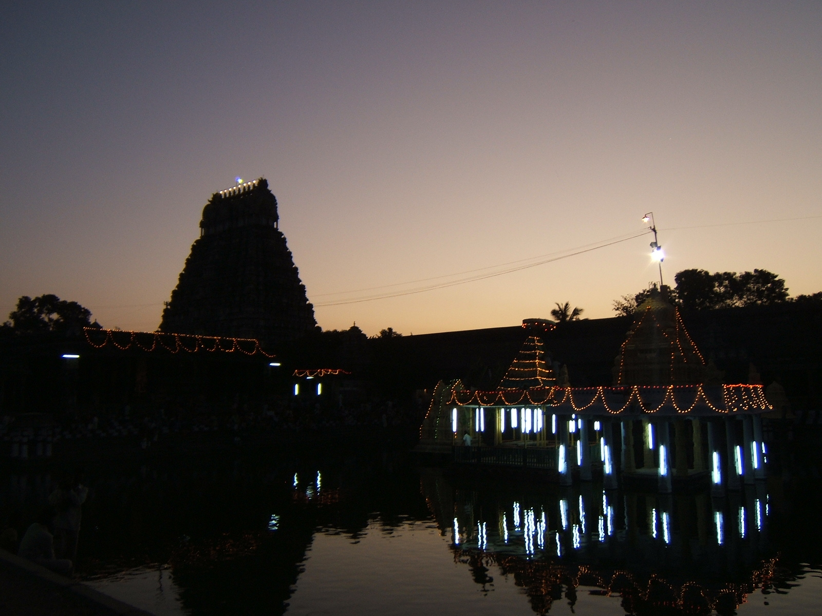 Varadaraja Vishnu temple in Kanchipuram, Tamil Nadu, during Float Festival